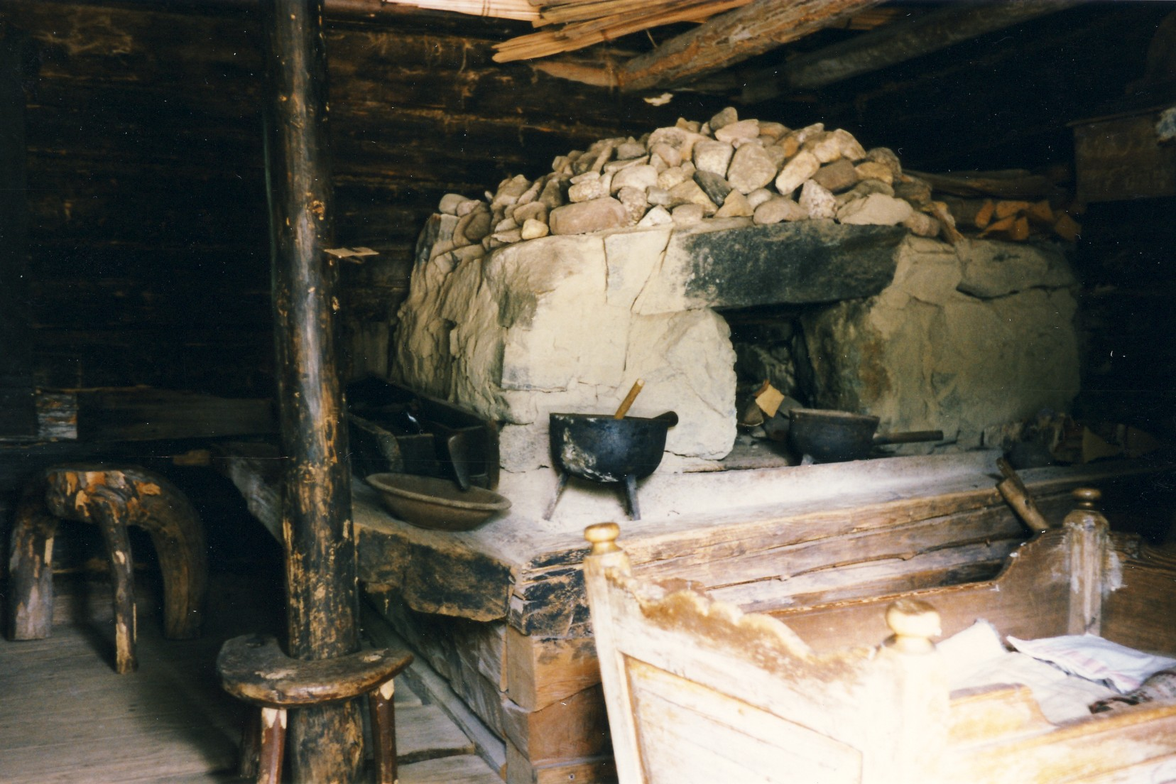 Finngammelgården, "Pörtet", rökungnen